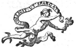 Marque de la revue Mercure de France extrait de la page de titre de la livraison datée octobre 1749.